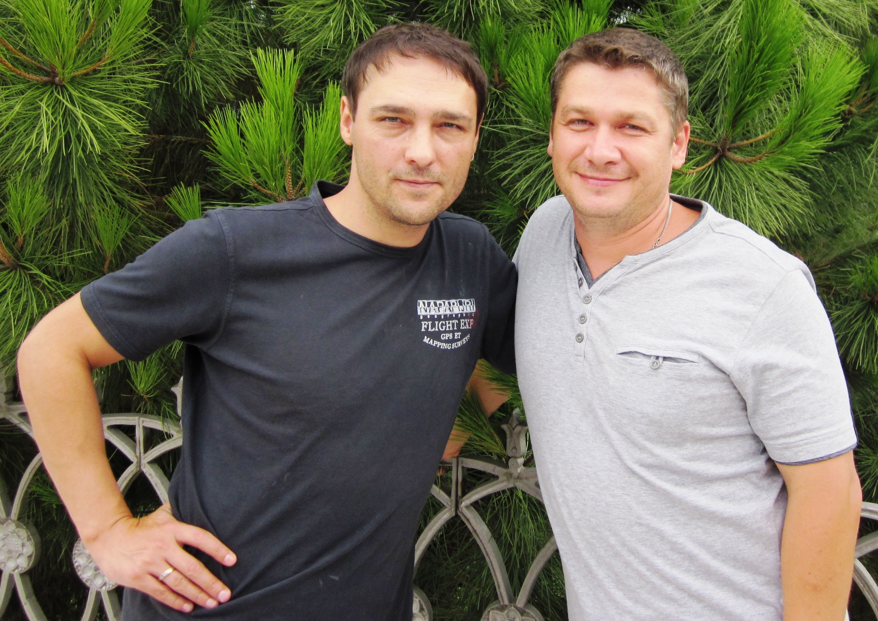 Андрей Картавцев и Юрий Шатунов